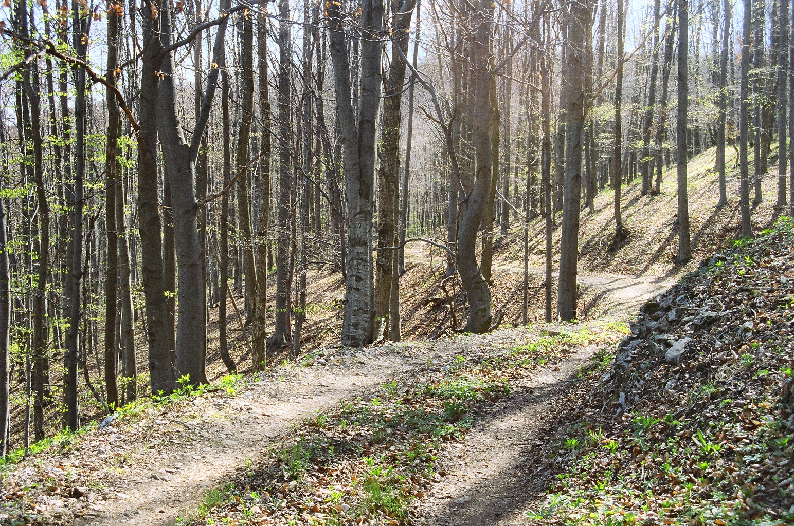 Bahntrasse der Szilvarad Waldbahn am Vörös-kö-berc